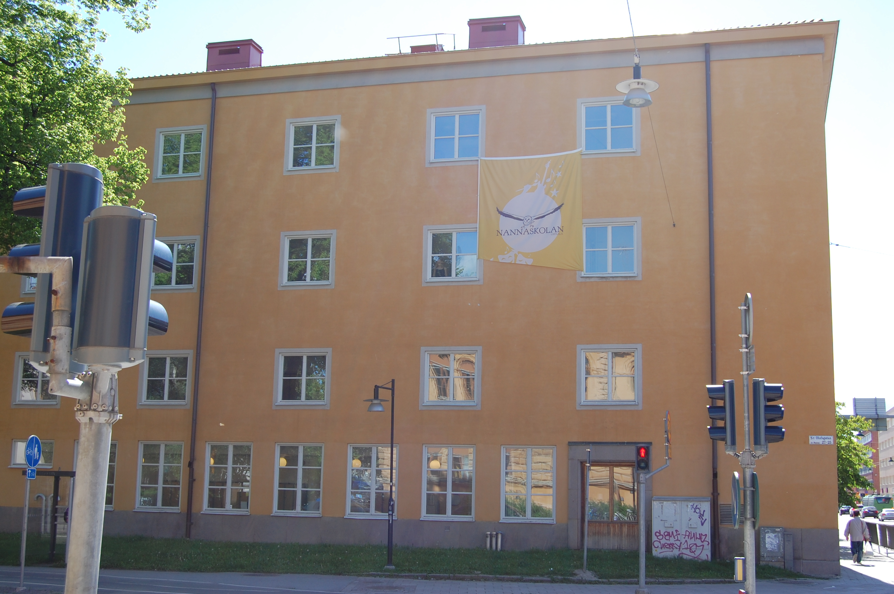 Nannaskolans lokaler på kungsgatan 24 i Uppsala.